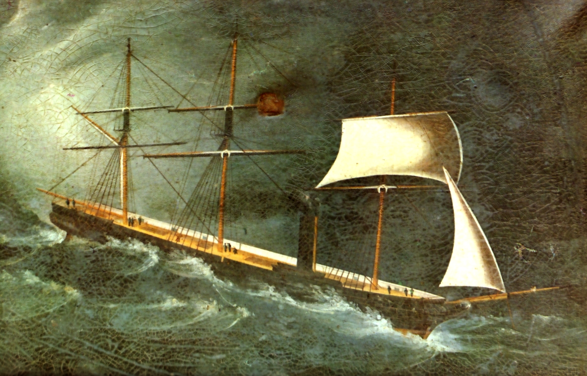 Pintura que pertenece a la Marina de Guerra del Perú, buque de guerra.